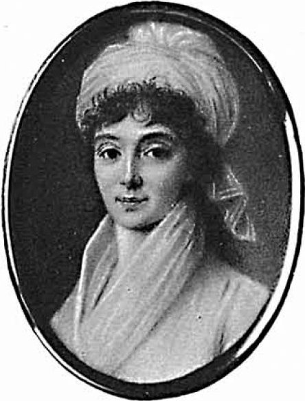 Графиня Елизавета Осиповна Разумовская (1764-1806) This image is available from the New York Public Library's Digital Library under the digital ID 1230505 This tag does not indicate the copyright status of the attached work. A normal copyright tag is still required. See Commons:Licensing for more information. English | français | русский | Türkçe | 中文 |+/−